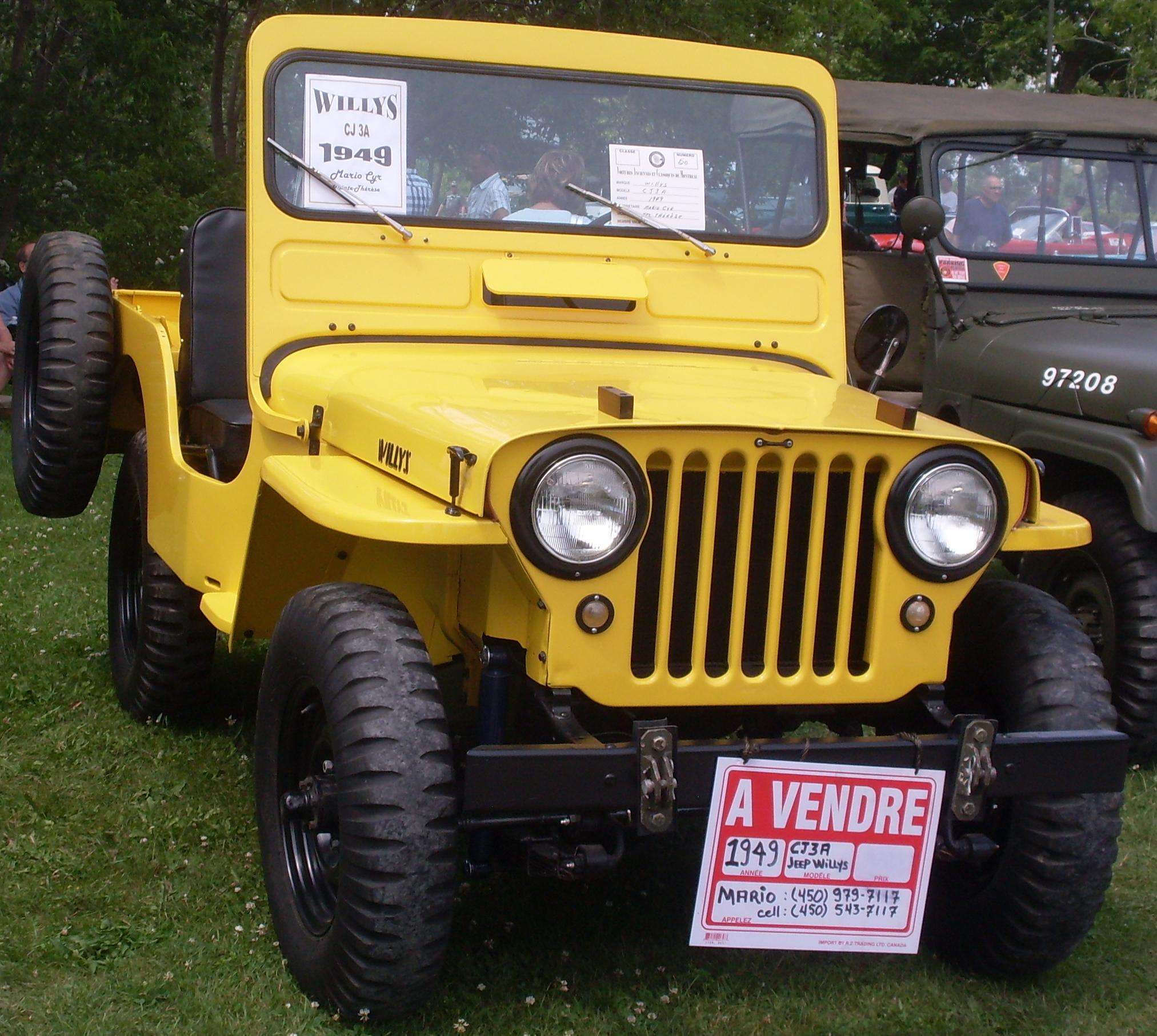 1949 Jeep CJ-3A photographed in Laval, Quebec, Canada at Auto classique VACM Laval.